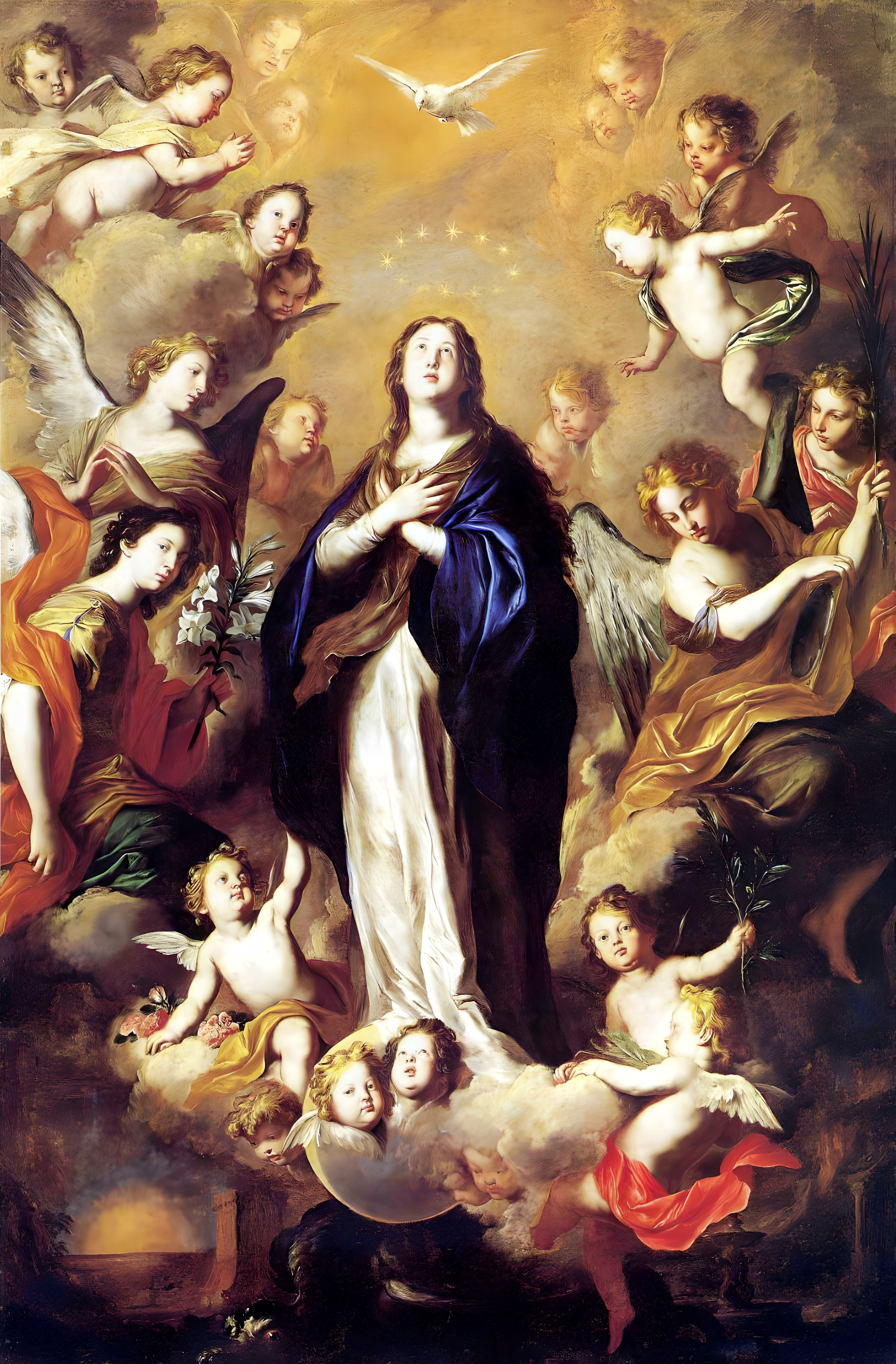 Palermo, Chiesa dell'Immacolata Concezione al Capo: Immacolata Concezione; olio su tela di Pietro Novelli del 1635.